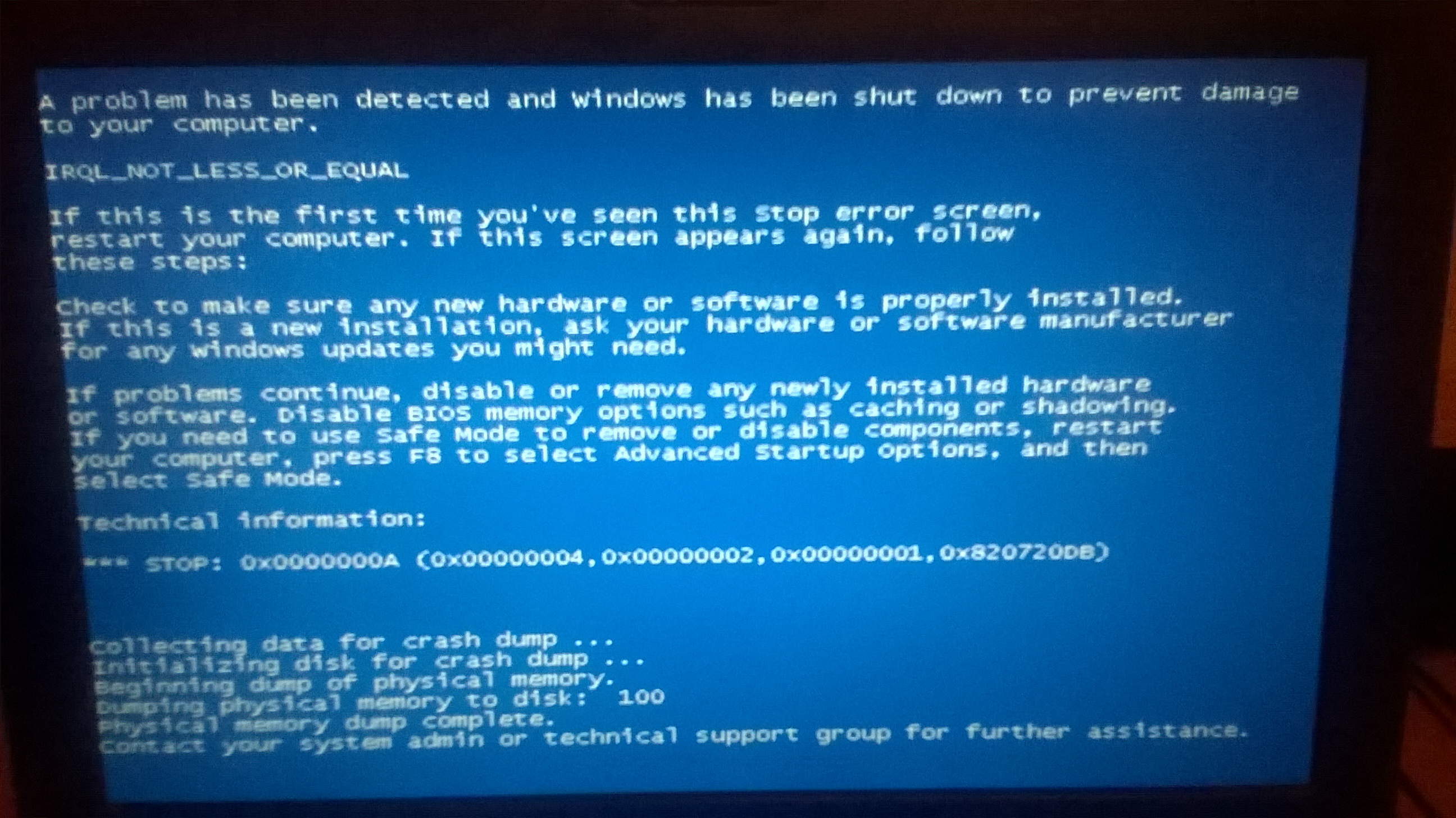 Falla o cuelgue que muestra IRQL_NOT_LESS_OR_EQUAL como ejemplo.